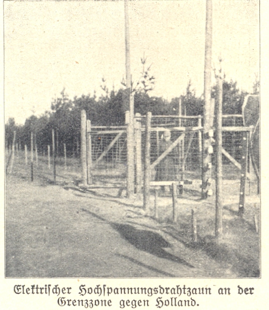 Das Grenzhochspannungshindernis an der belgisch-niederländischen Grenze 1915 - 1918